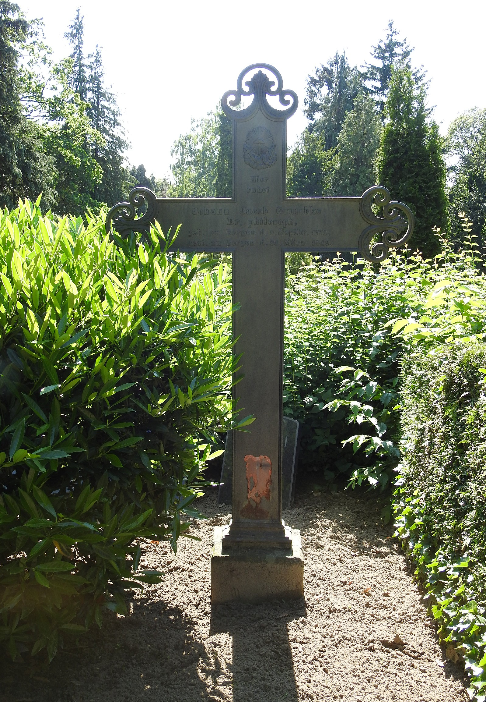 Grab von Johann Jacob Grümbke auf dem Alten Friedhof in Bergen auf Rügen Inschrift: Hier ruhet / Johann Jacob Grumbke / Dr. philosoph, / geb. zu Bergen d. 9. Septbr. 1771, / gest. zu Bergen d. 23. März 1849.